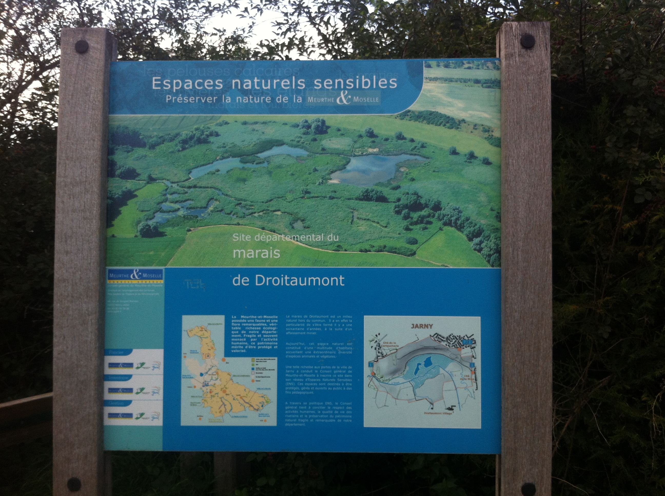 Les Marais de Jarny Droitaumont